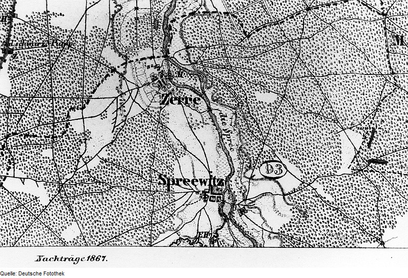 Original image description from the Deutsche Fotothek Spreetal-Zerre. Topographische Karte vom Preußischen Staate, Blatt 234 Muskau, aufgen. 1846, Nachträge 1867